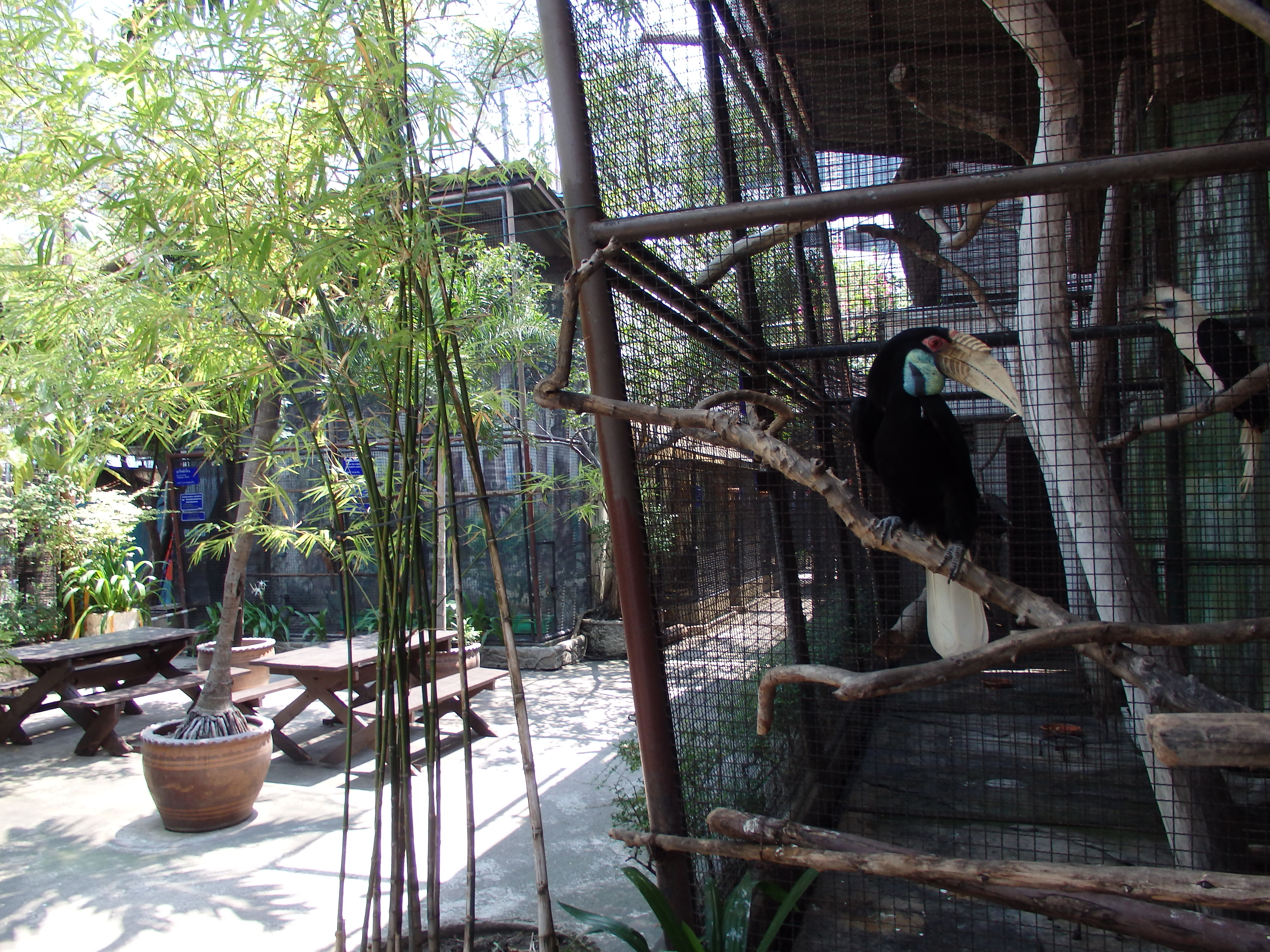 Pata Zoo